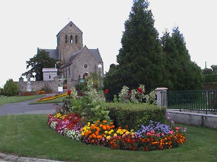 Eglise de Vivaise